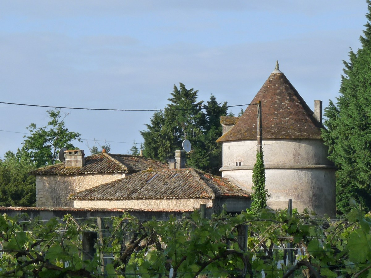 Le Logis, Reignac, Charente, France